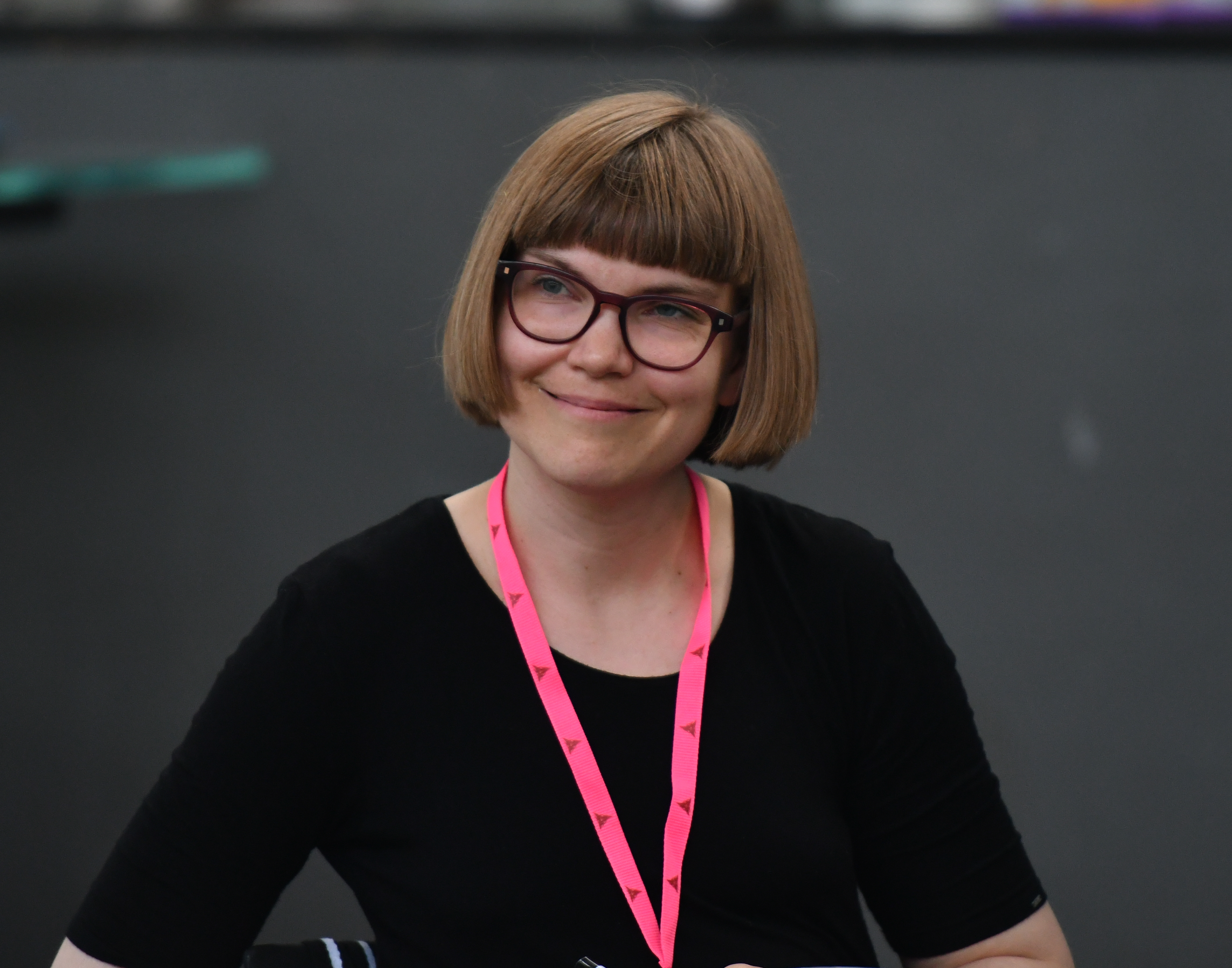 Sara Bergmak Elfgren på Fantastika 2018, Swecon 2018.